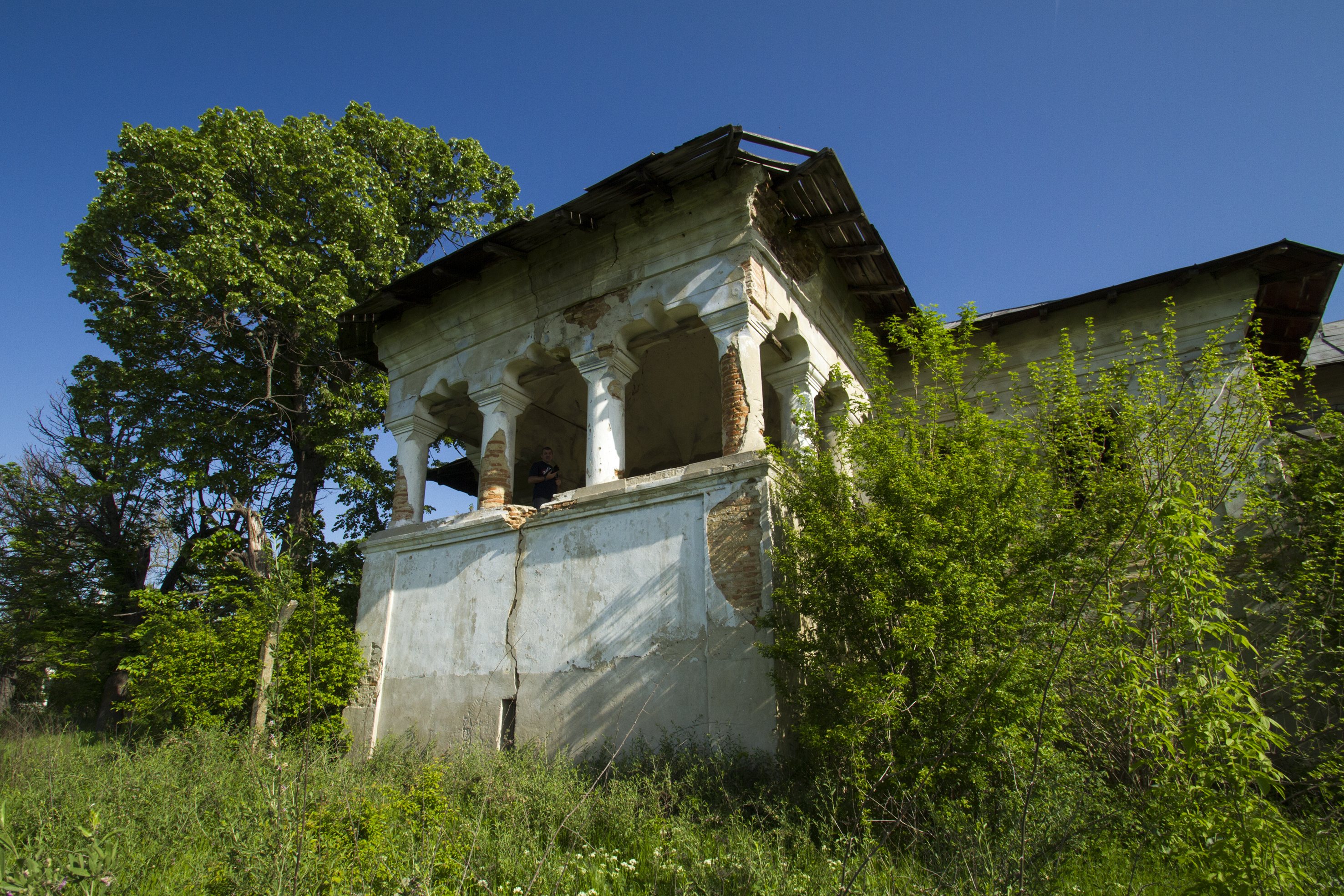 Casa Coțofenilor 01